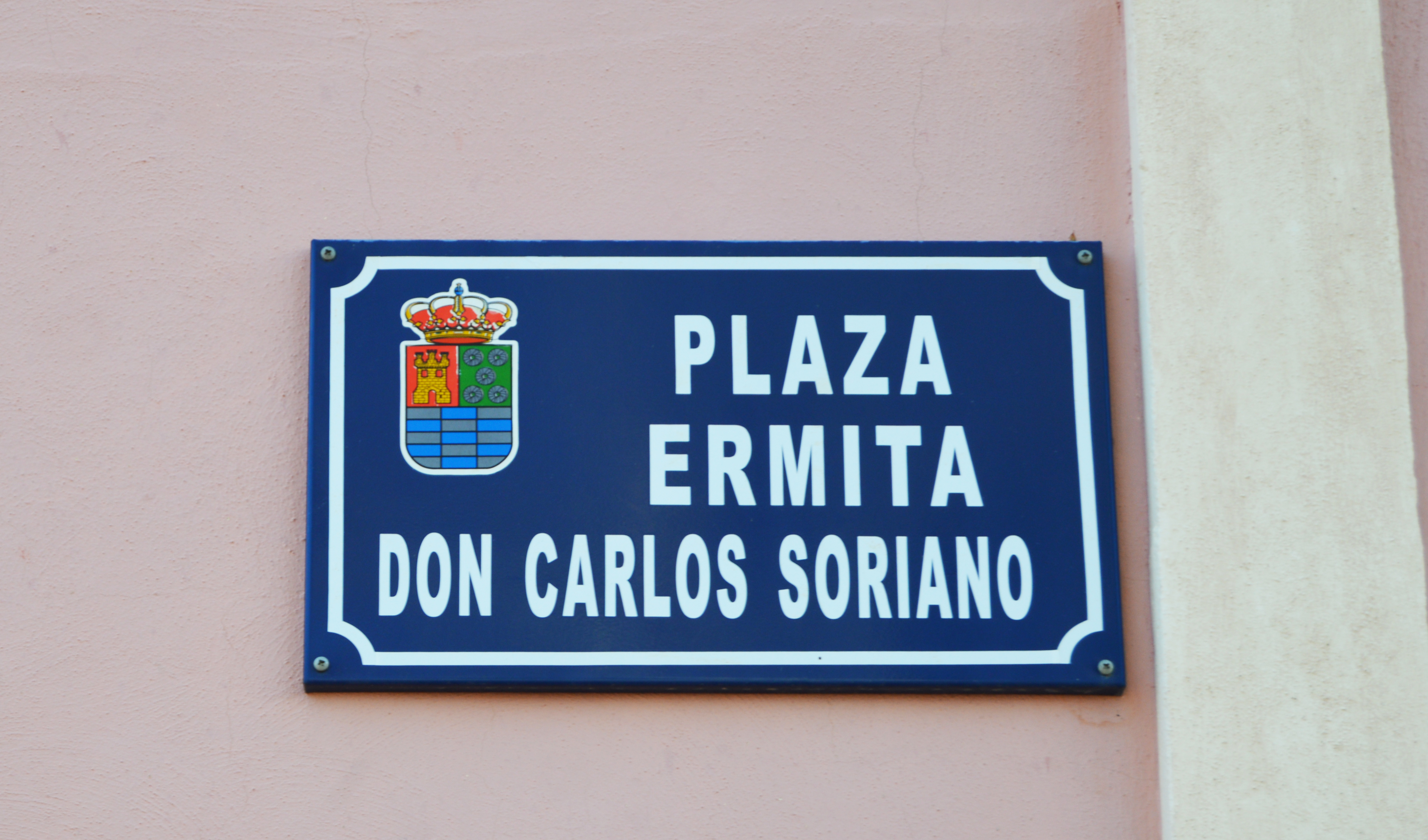 En esta imagen vemos la placa de la plaza Carlos Soriano